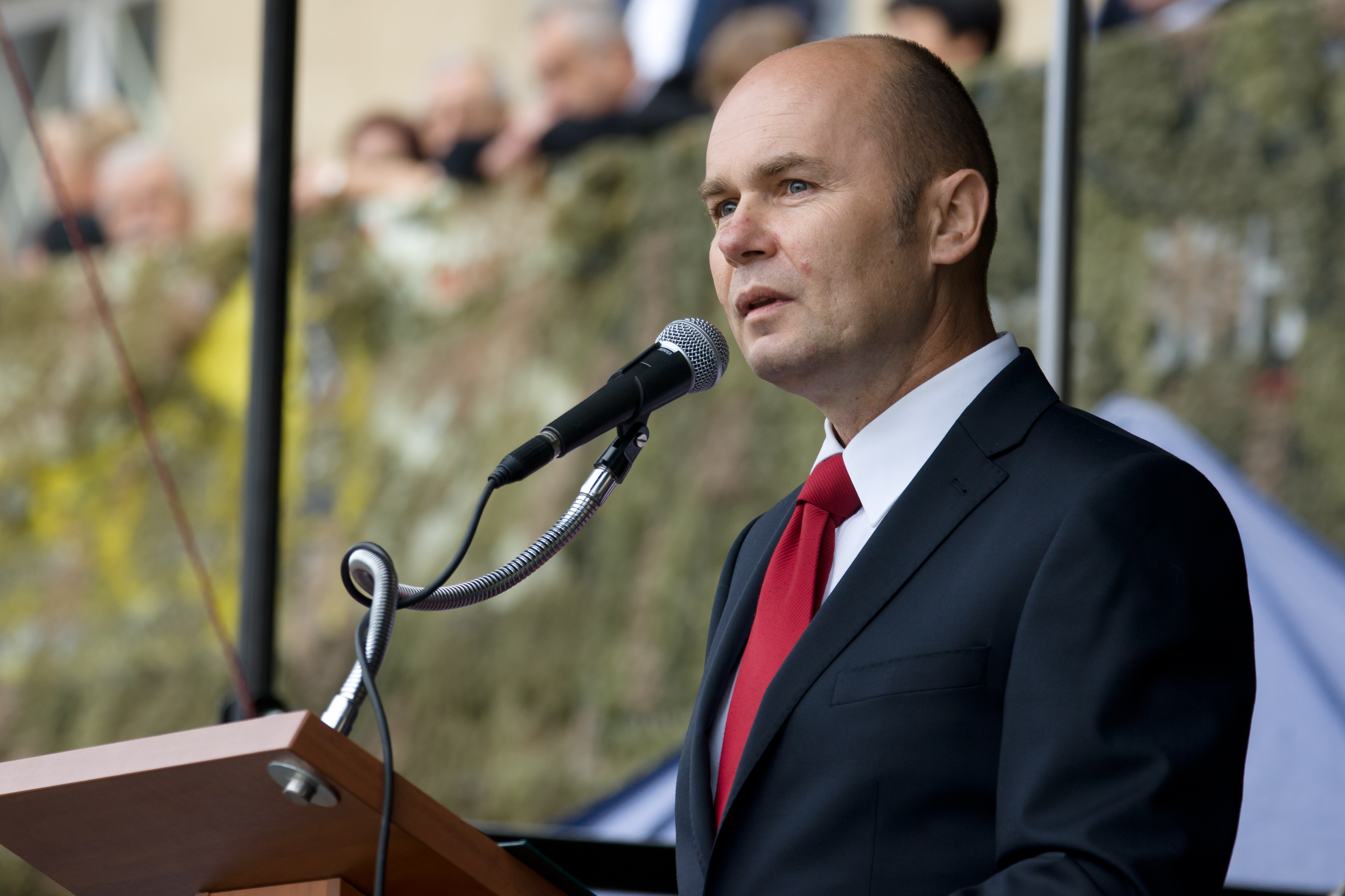 V rekonstrukcja Bitwy pod Mławą. Burmistrz miasta Sławomir Kowalewski przemawia przed inscenizacją nalotu na miasto.